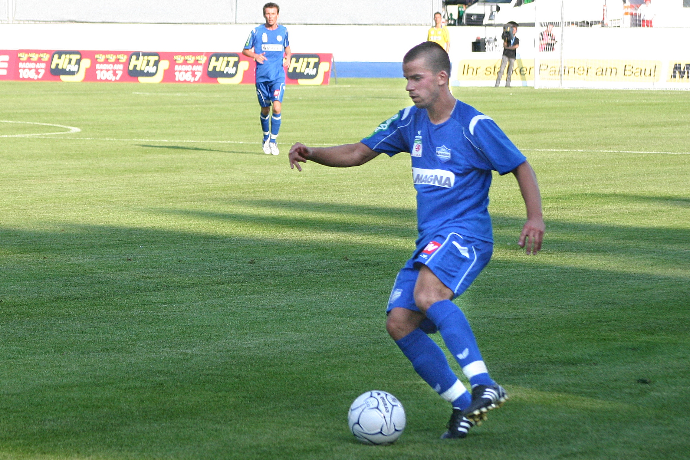 Tomas Šimkovič, FC Magna Wiener Neustadt